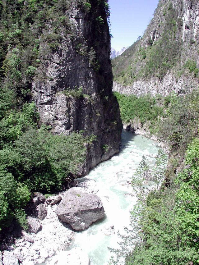 SR 203 Agordina, vecchio tracciato attraverso la gola "dei Castéi"